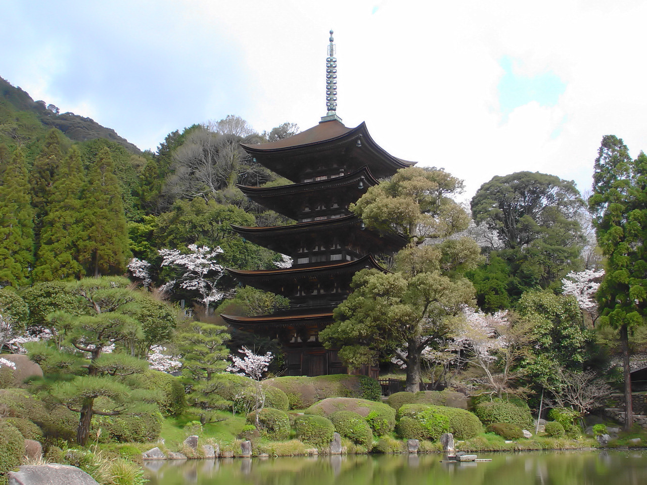 Ruriko-ji Temple. Taken at Yamaguchi City, Yamaguchi Prefecture, Japan.